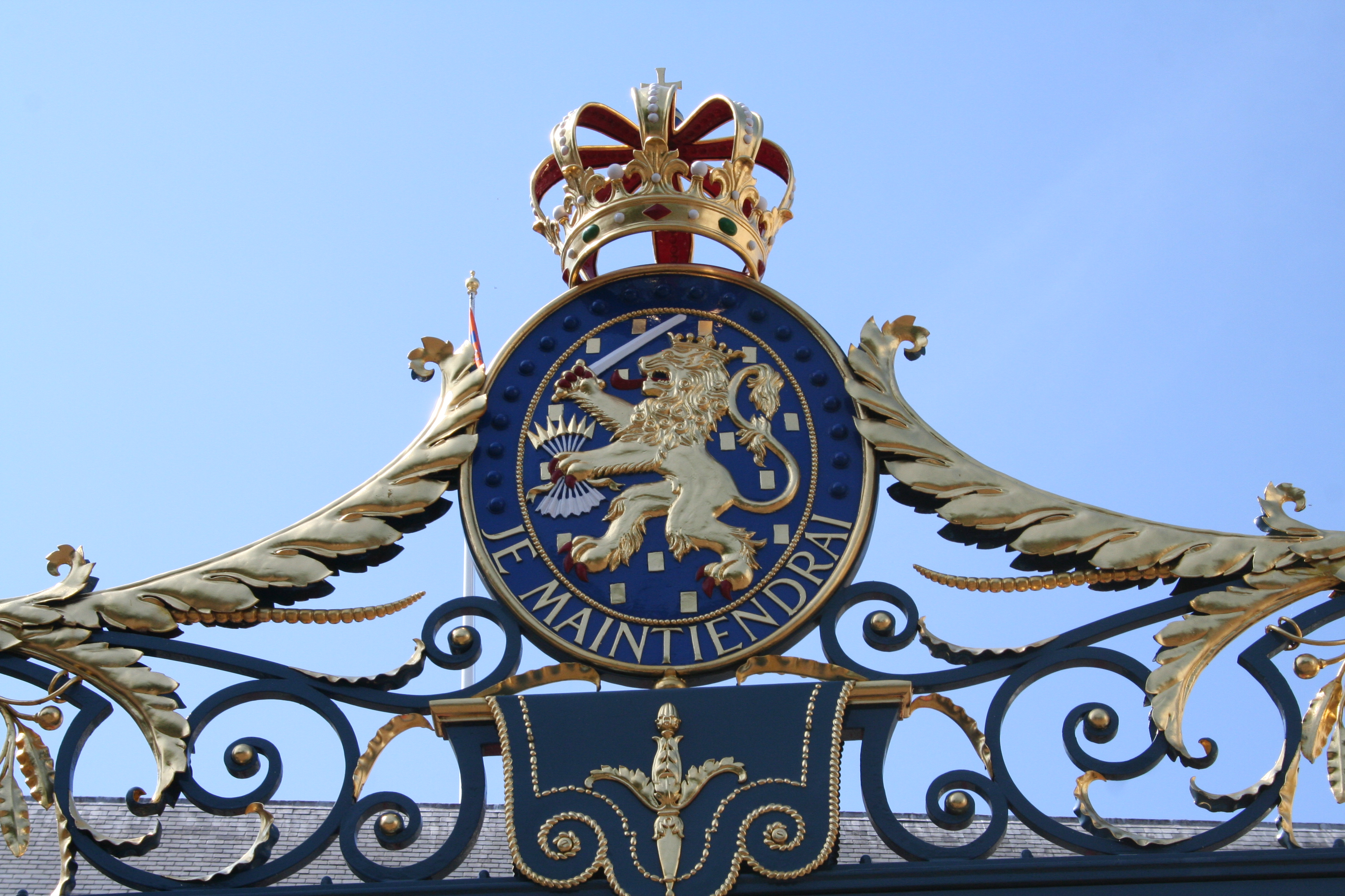 Wapen met lijfspreuk der Nederlanden, boven entreeboog van Paleis Noordeinde.